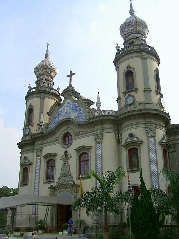 Igreja Nossa Senhora do Brasil, no Jardim América, em São Paulo.